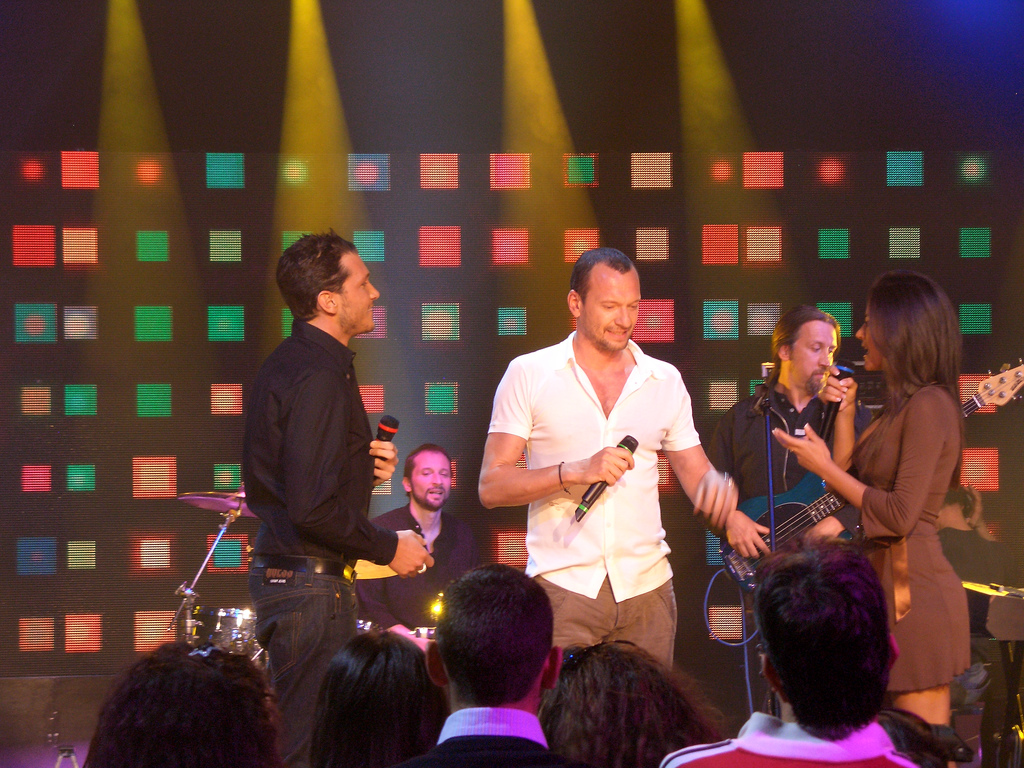 Italian singer Biagio Antonacci